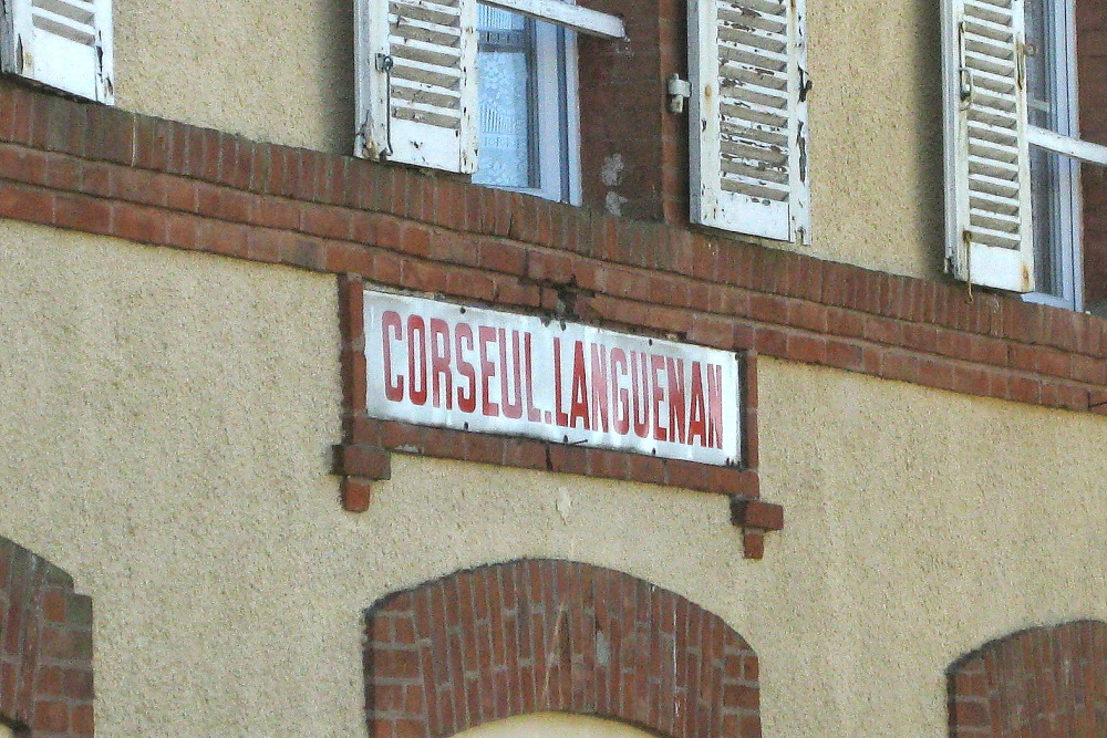 Détail de la plaque nominative placée sur le bâtiment voyageurs de la gare de Corseul - Languenan